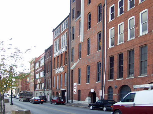 Photographer：Hidenori Inagaki Photographed Date: 10/15/2004 File Uploaded by photographer under GFDL and CC-BY-2.5 license View of 1st Street down town Nashville, TN